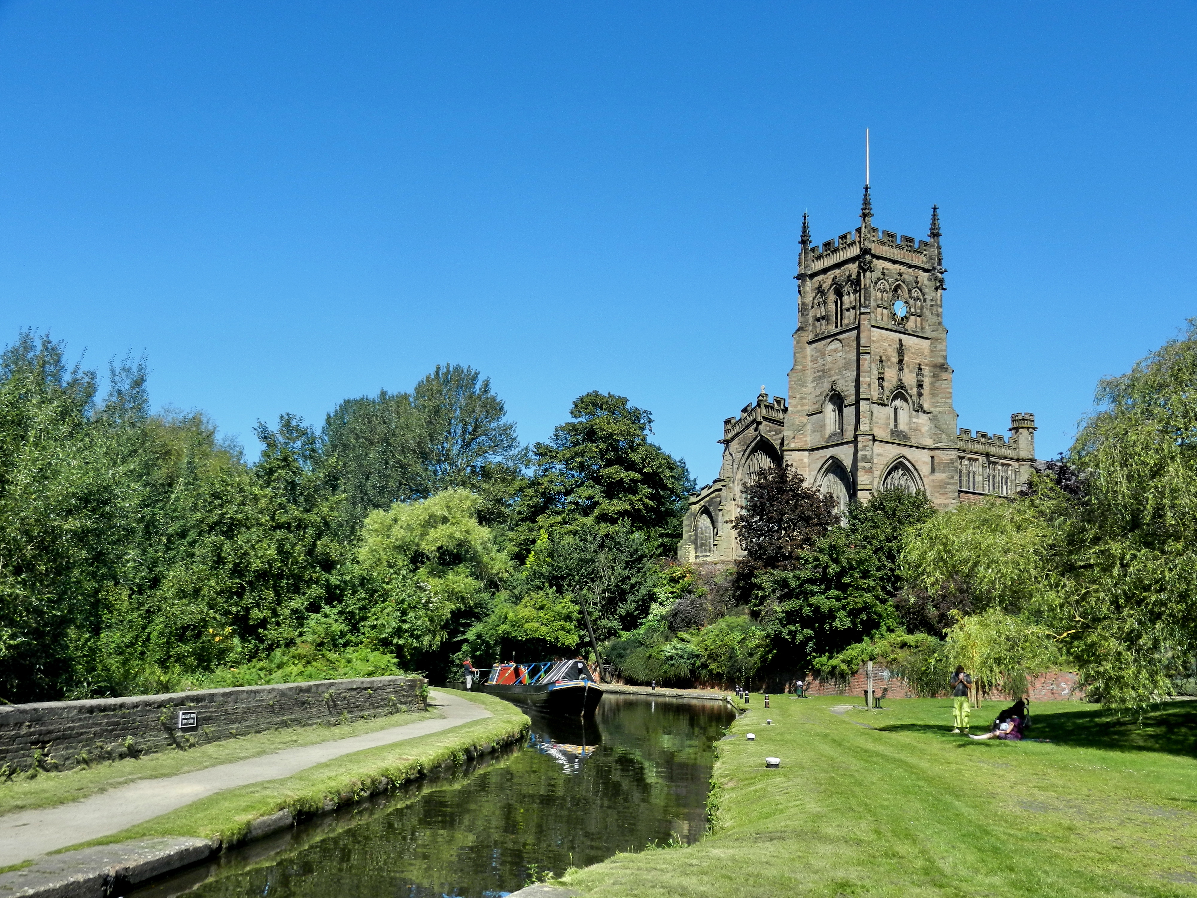 Kiddenminster